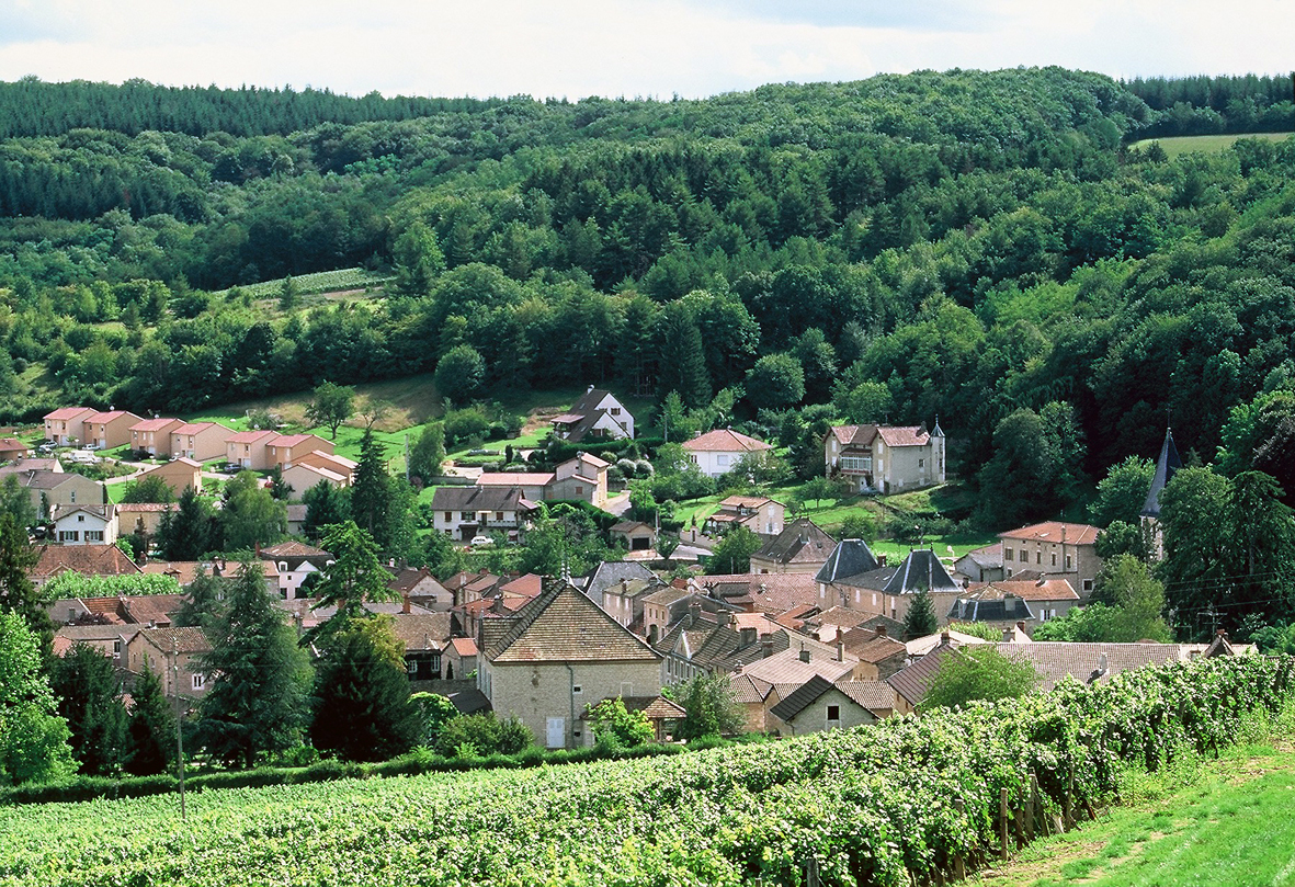 Le bourg de Lugny vu du sommet de la colline de Saint Pierre. Vu de Saint Pierre, le bourg paraît se blottir au pied de la montagne du Château. Il est, de fait, niché en fond de vallon dans un cirque de collines pentues qui, boisées ou recouvertes de vignoble, le dominent de toutes parts, fermant l’espace et limitant son développement. Auteur Photographie personnelle prise et mise en ligne par Frikar.